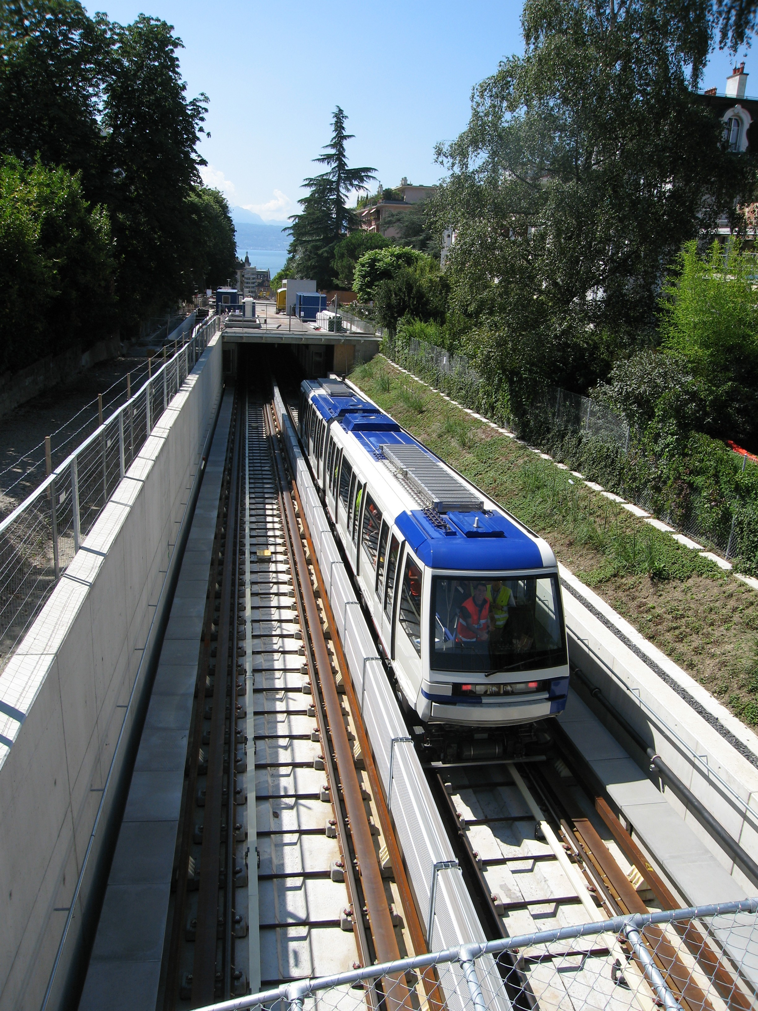 Ouverture zone sud